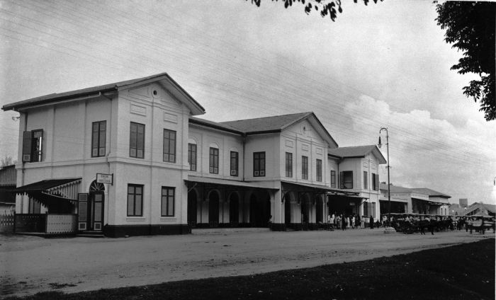 Foto. Het station van Medan aan de Deli-spoorlijn, oostkust Sumatra